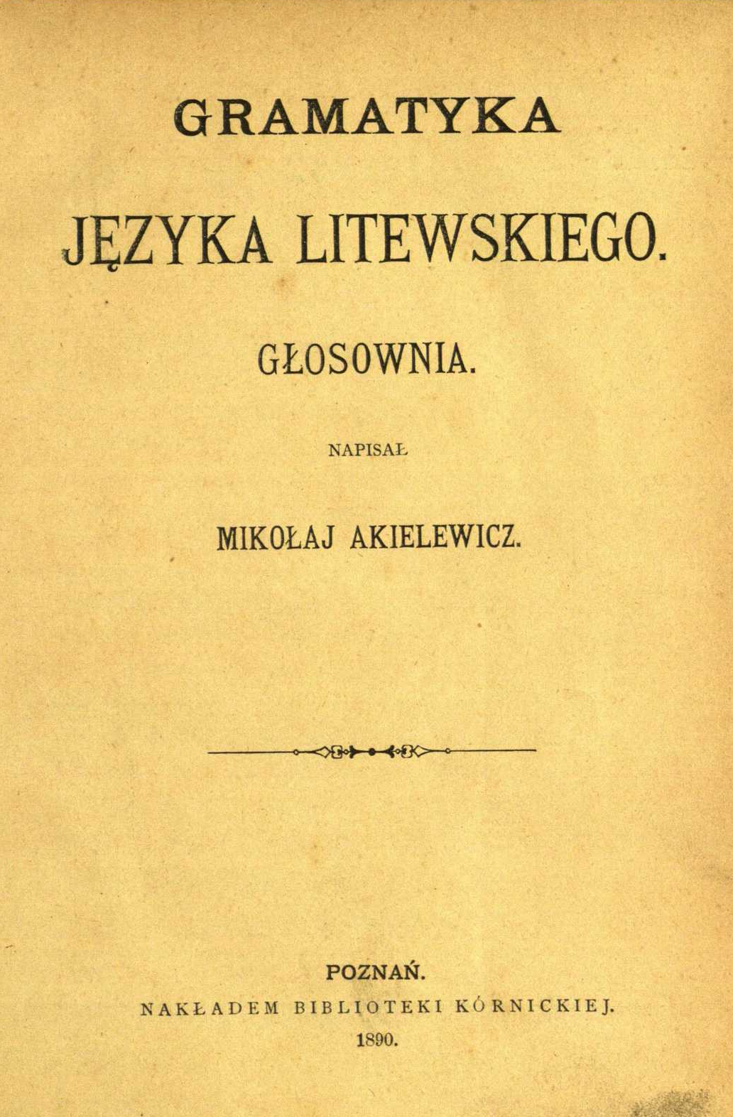 strona tytułowa książki Mikołaja Akielewicza "Gramatyka języka litewskiego - Głosownia"